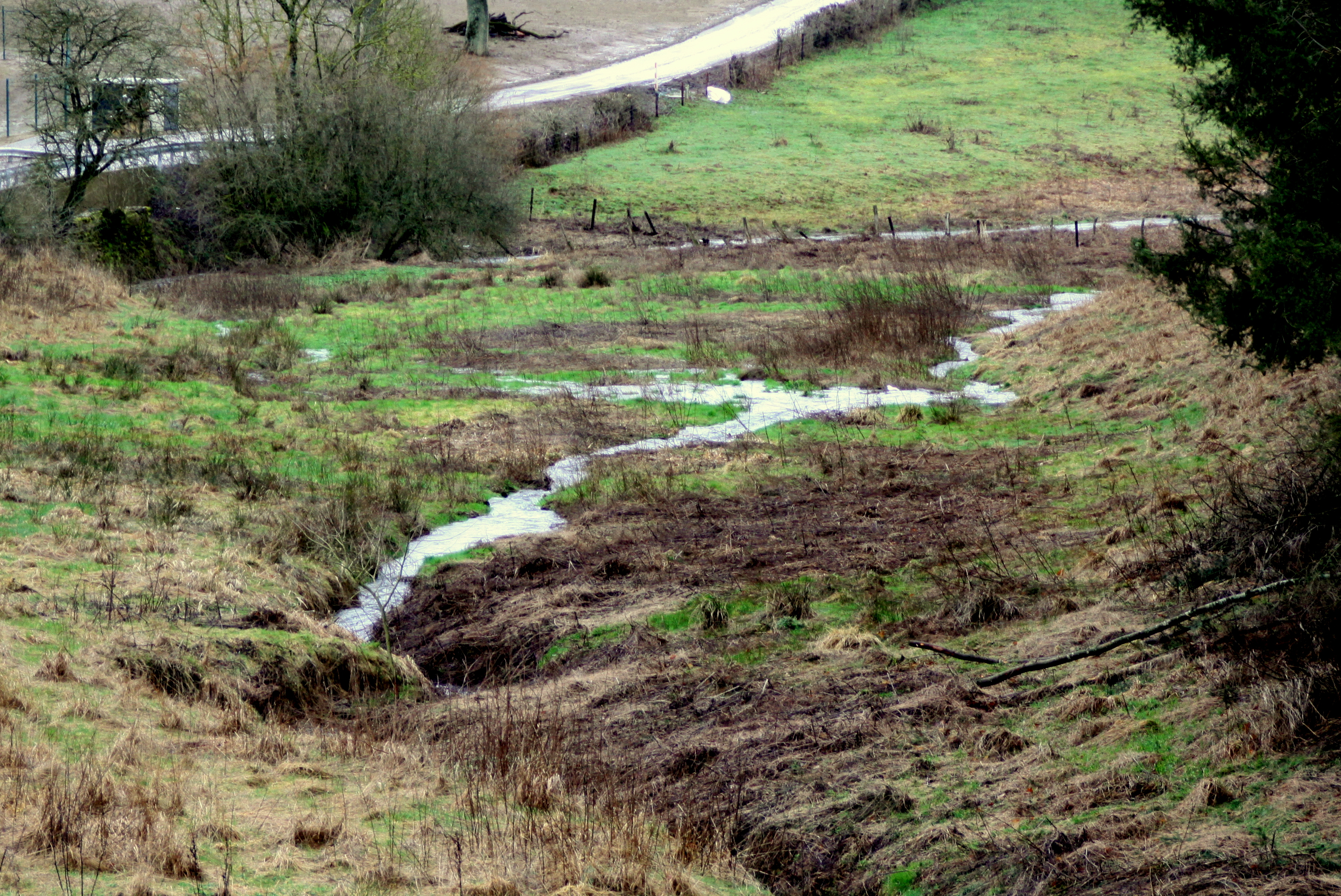 D'Fëschbech um Zesummelaf mat der Irbich